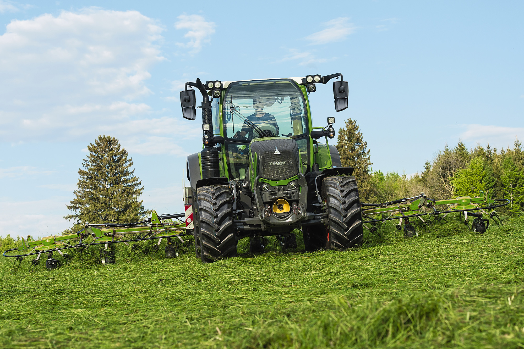 Fendt 300 Vario mit einem Fendt Twister